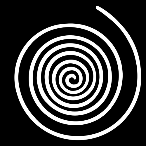 「渦巻」紋（染抜）